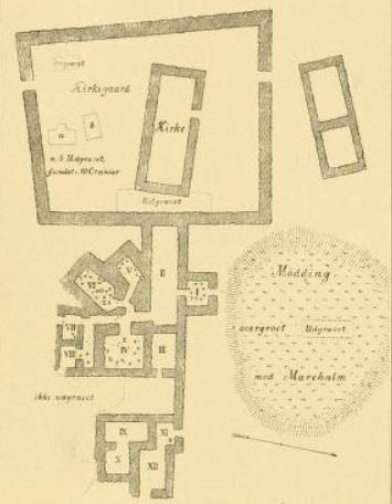 Plan de l'église d'Undir Hofda.